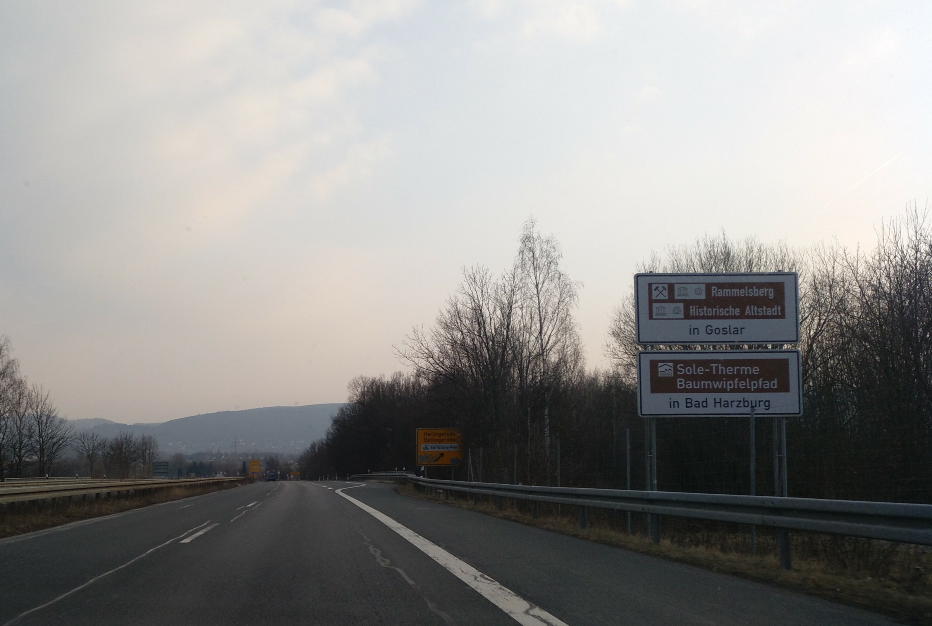 Informationsschilder zu den Städten Goslar und Bad Harzburg an der Bundesstraße 6/künftige Bundesautobahn 369